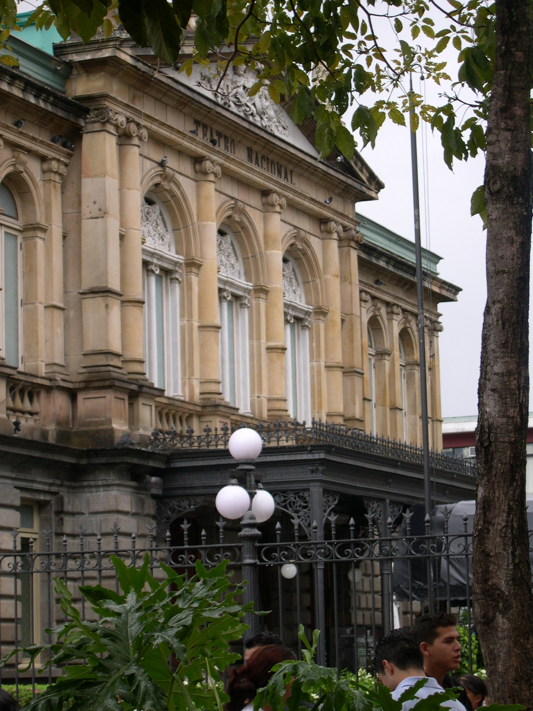 Teatro Nacional of San José, Costa Rica